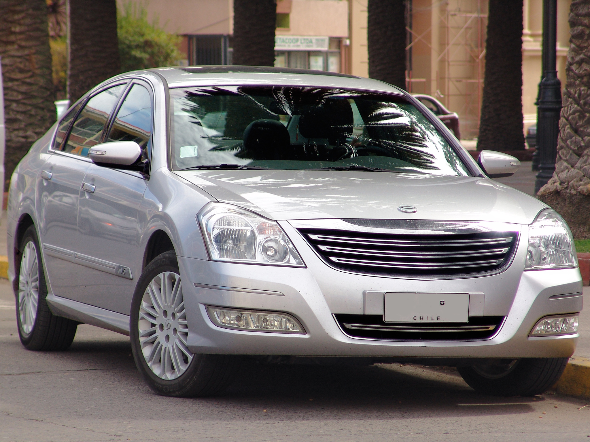 Samsung SM7 V6 2.3 LE 2010